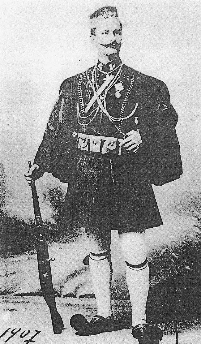 Гръцкият андартски капитан Николаос Дубиотис.